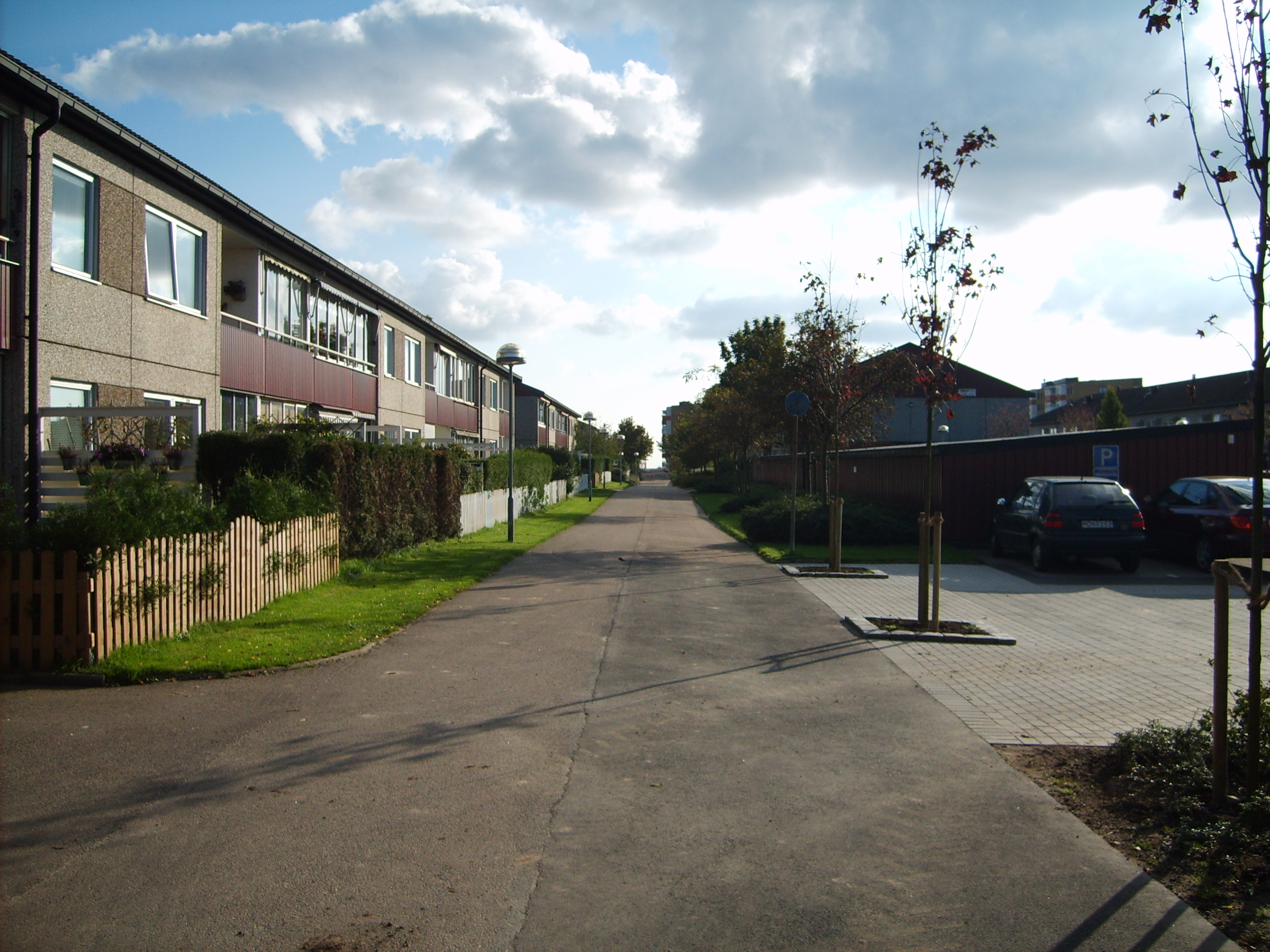 Bilden föreställer några av låghusen, tvåvåningshusen på Norra Raus/Ättekulla.